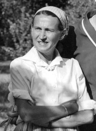 Barbro Svinhufvud.